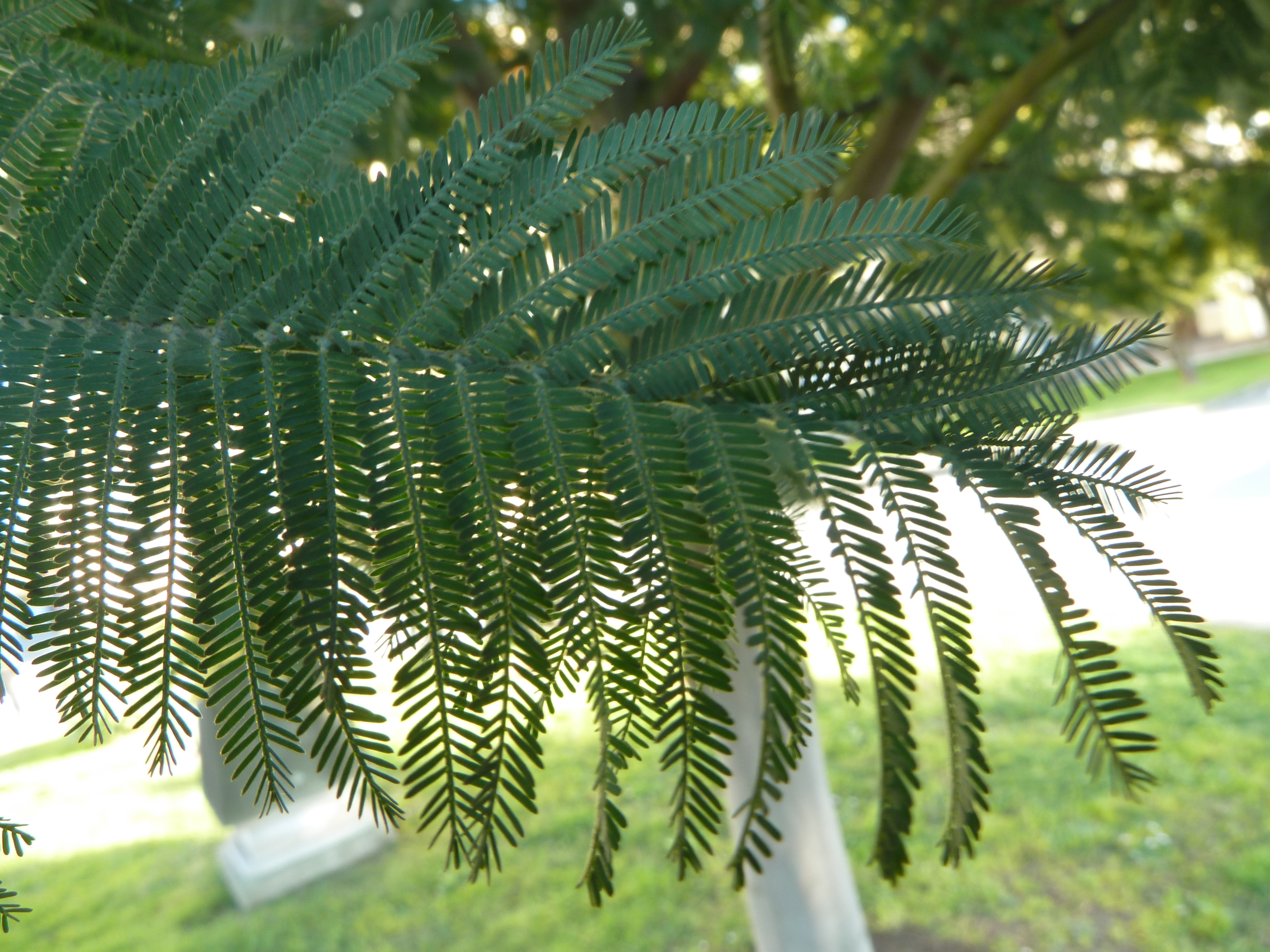 Folla de mimosa en Tarrío, Culleredo.